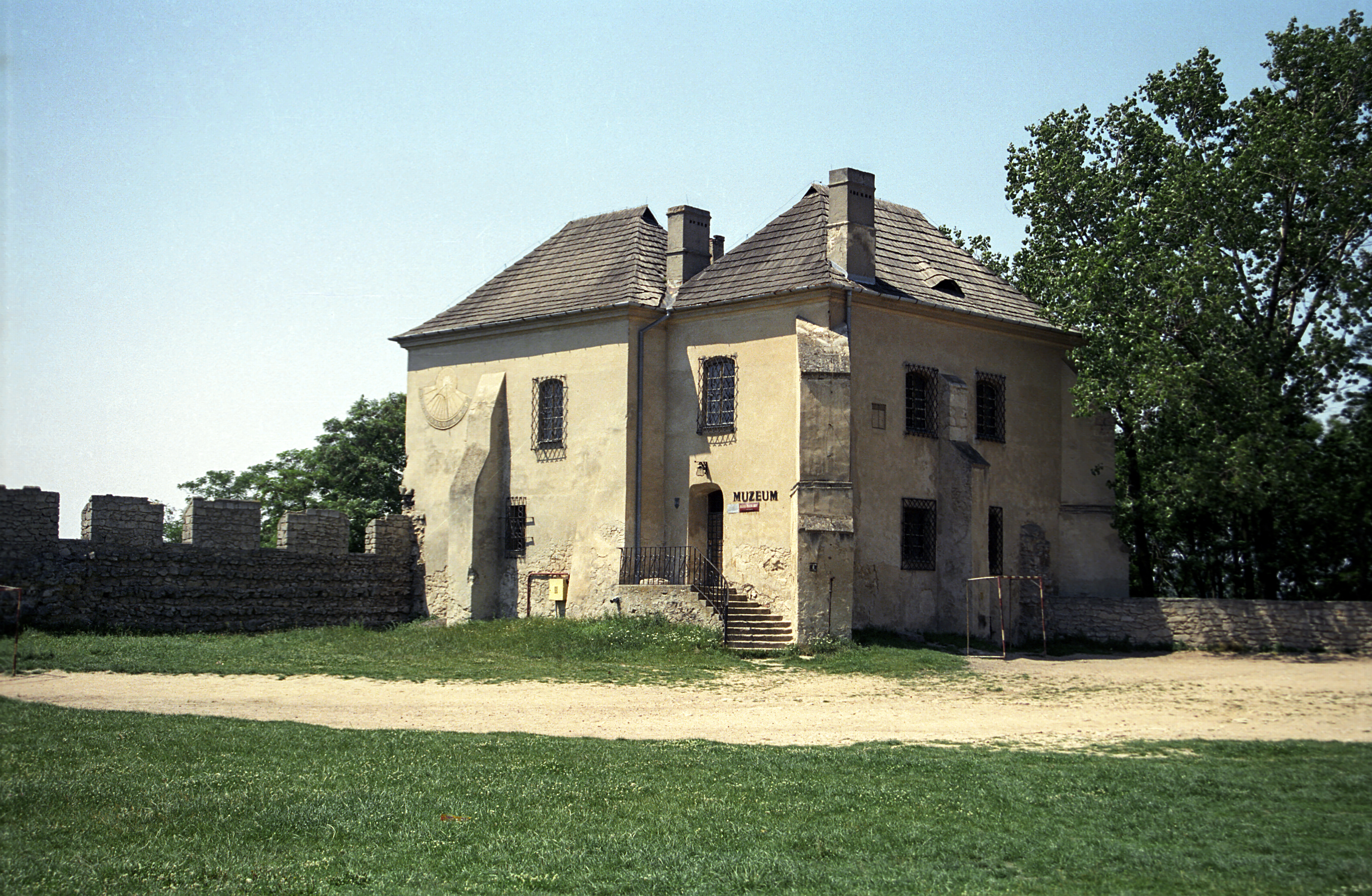 Szydłów, ul. Szkolna - „Skarbczyk” w zespole zamkowym, 1528, 1960